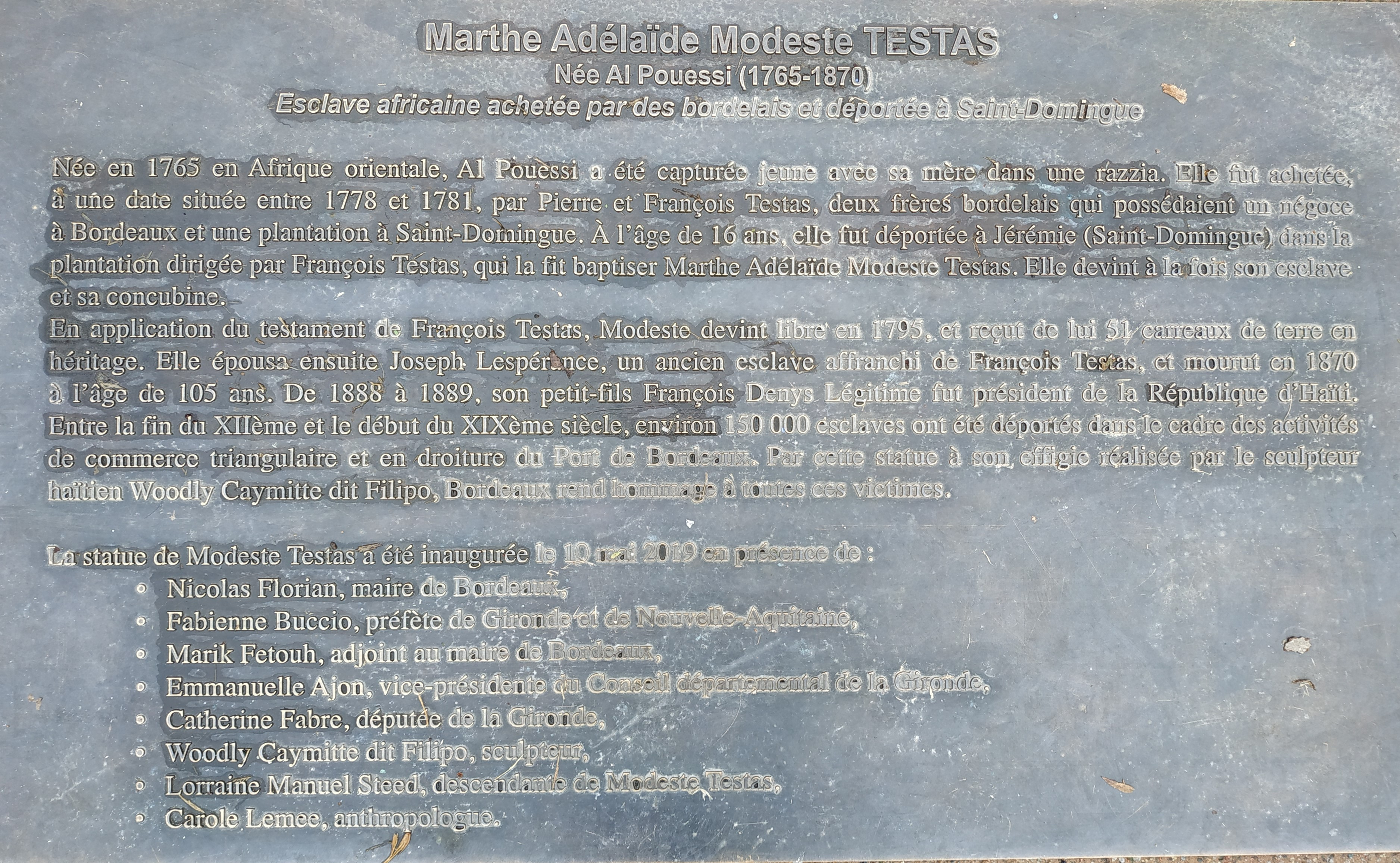 Résumé de la vie de Modeste Testas, esclave, affranchie par les frères Testas de Bordeaux